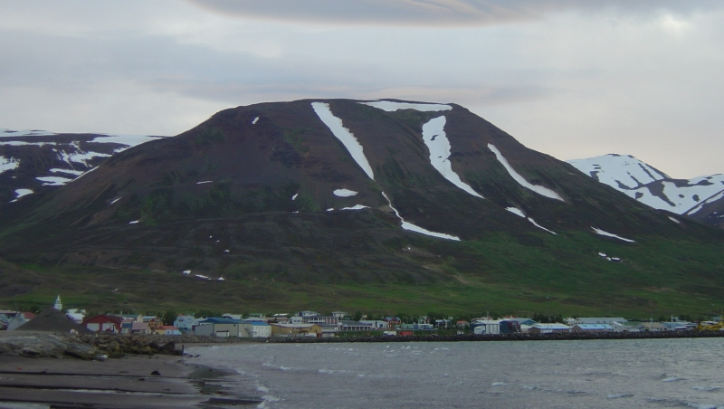 Der Hafen von Dalvík